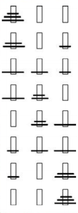 Com 3 discos, o quebra-cabeça pode ser resolvido em 7 movimentos. O número mínimo de movimentos necessários para resolver um quebra-cabeça da Torre de Hanói é (2n - 1), onde n é o número de discos.